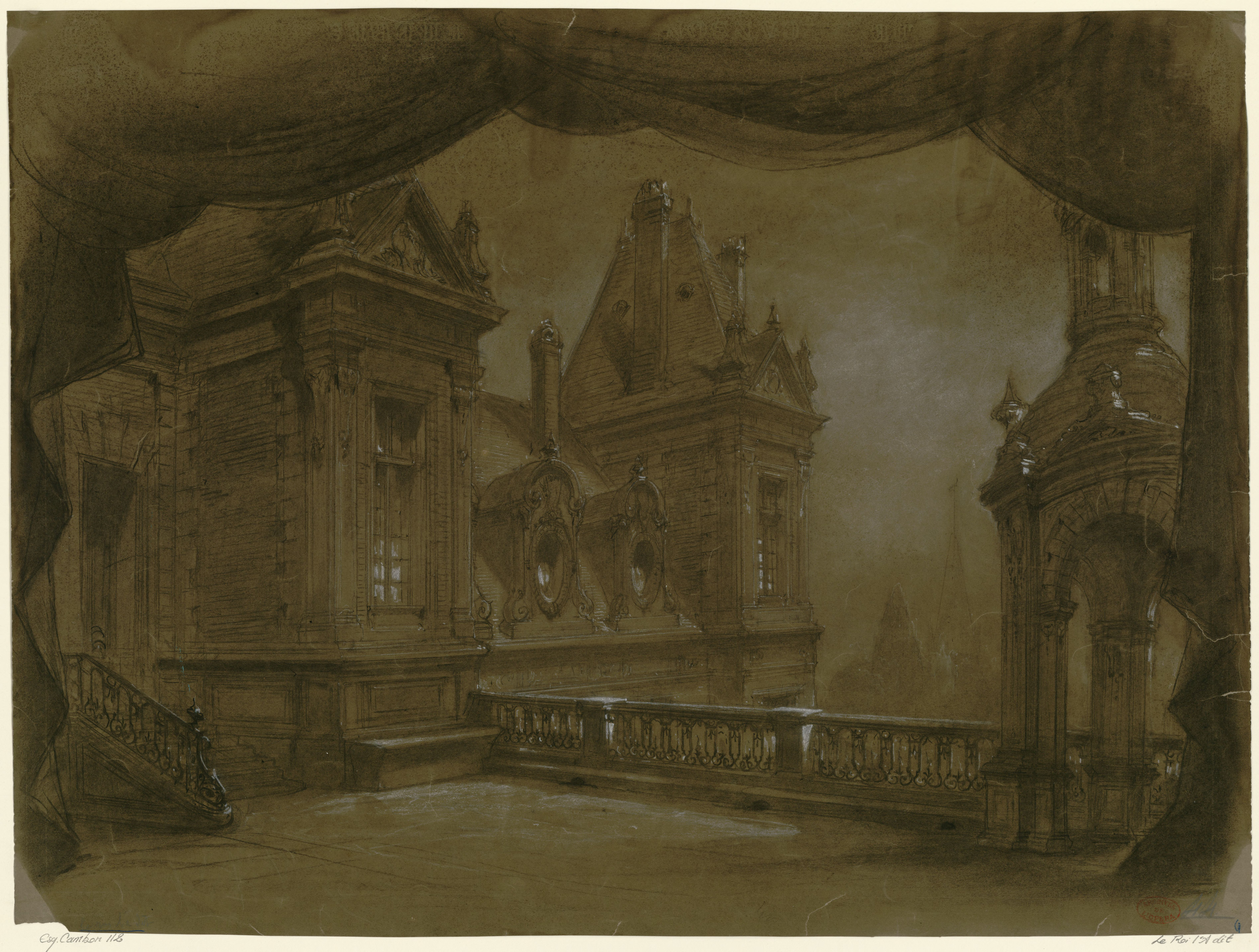 taleau d'un décor de l'opéra comique le roi l'a dit de Delibes